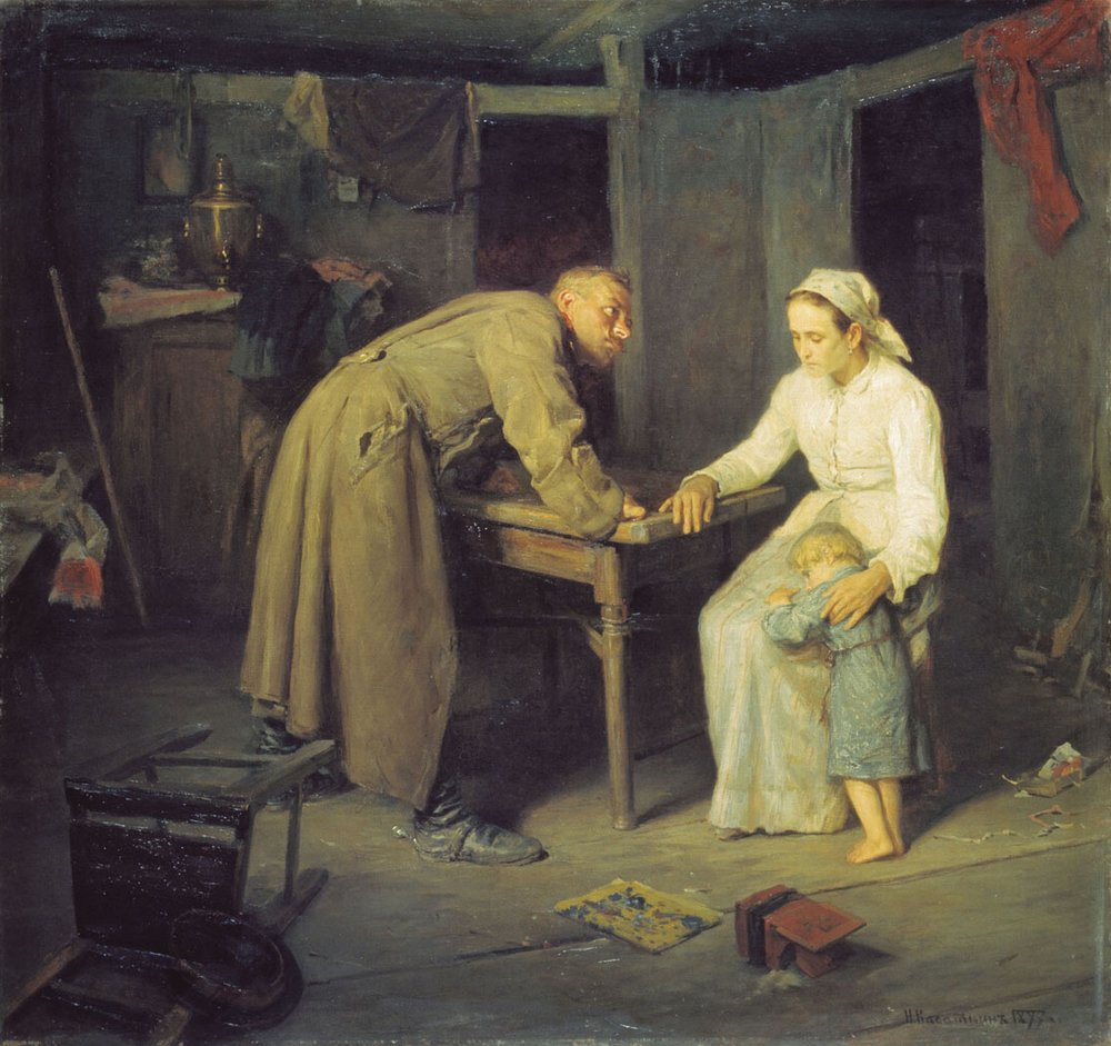 Кто? 1897